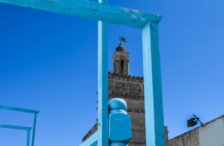 Minaret de la mosquée Bou Chouaïcha à Sfax (Tunisie)